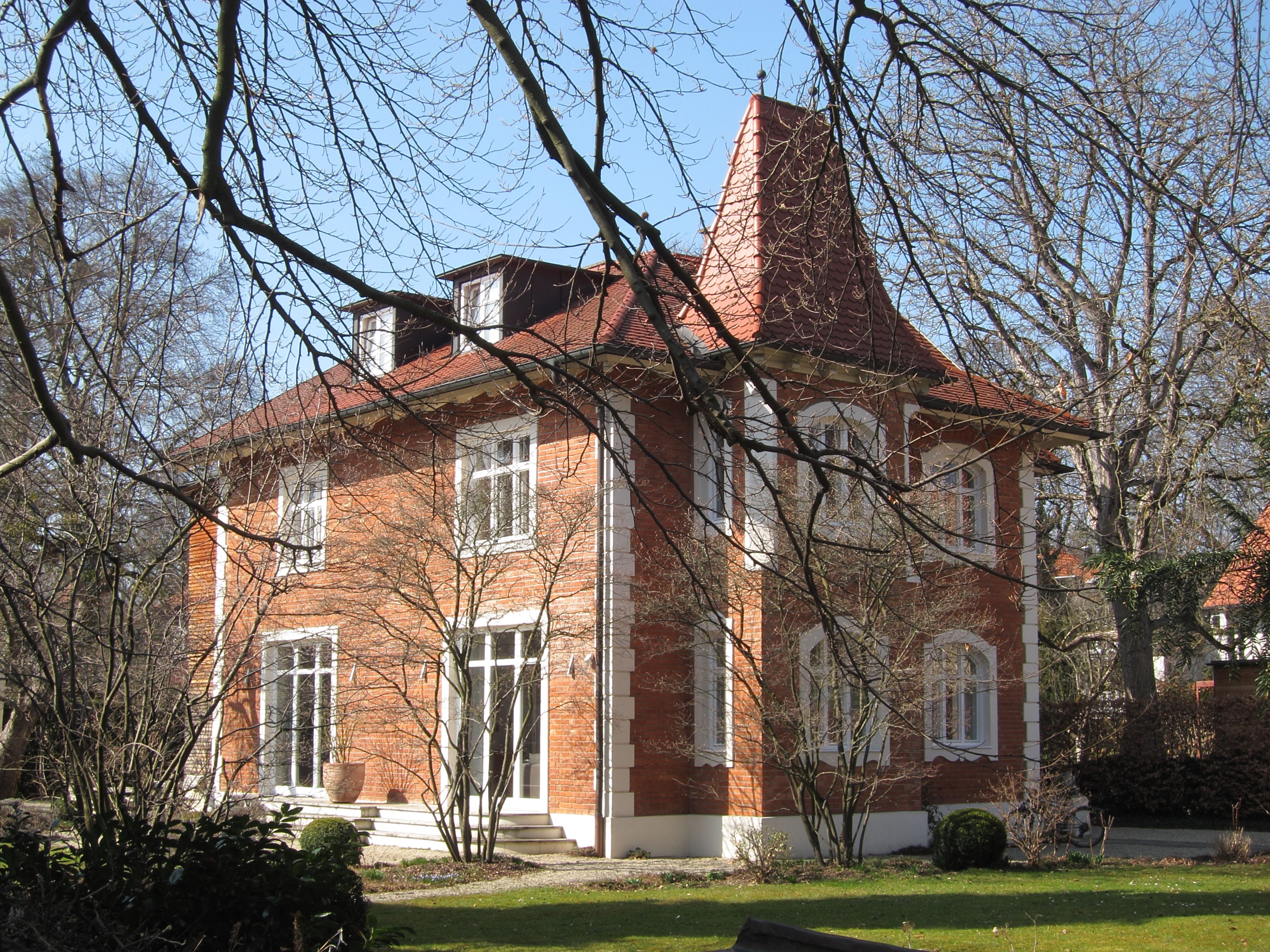 Floßmannstraße 25; Malerische Villa, um 1895 aus dem Büro August Exter.